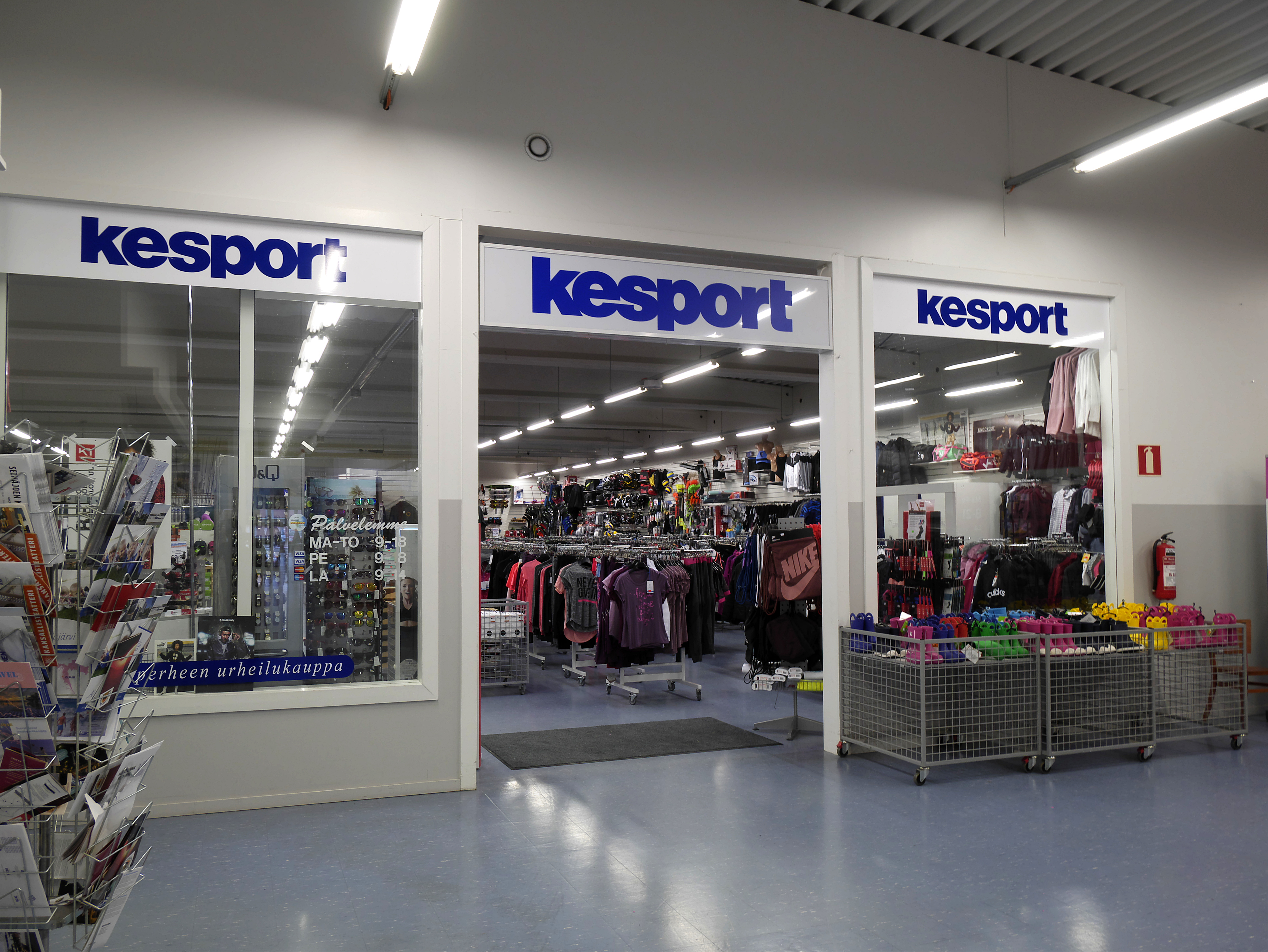 Kesport -myymälä Alajärvellä.